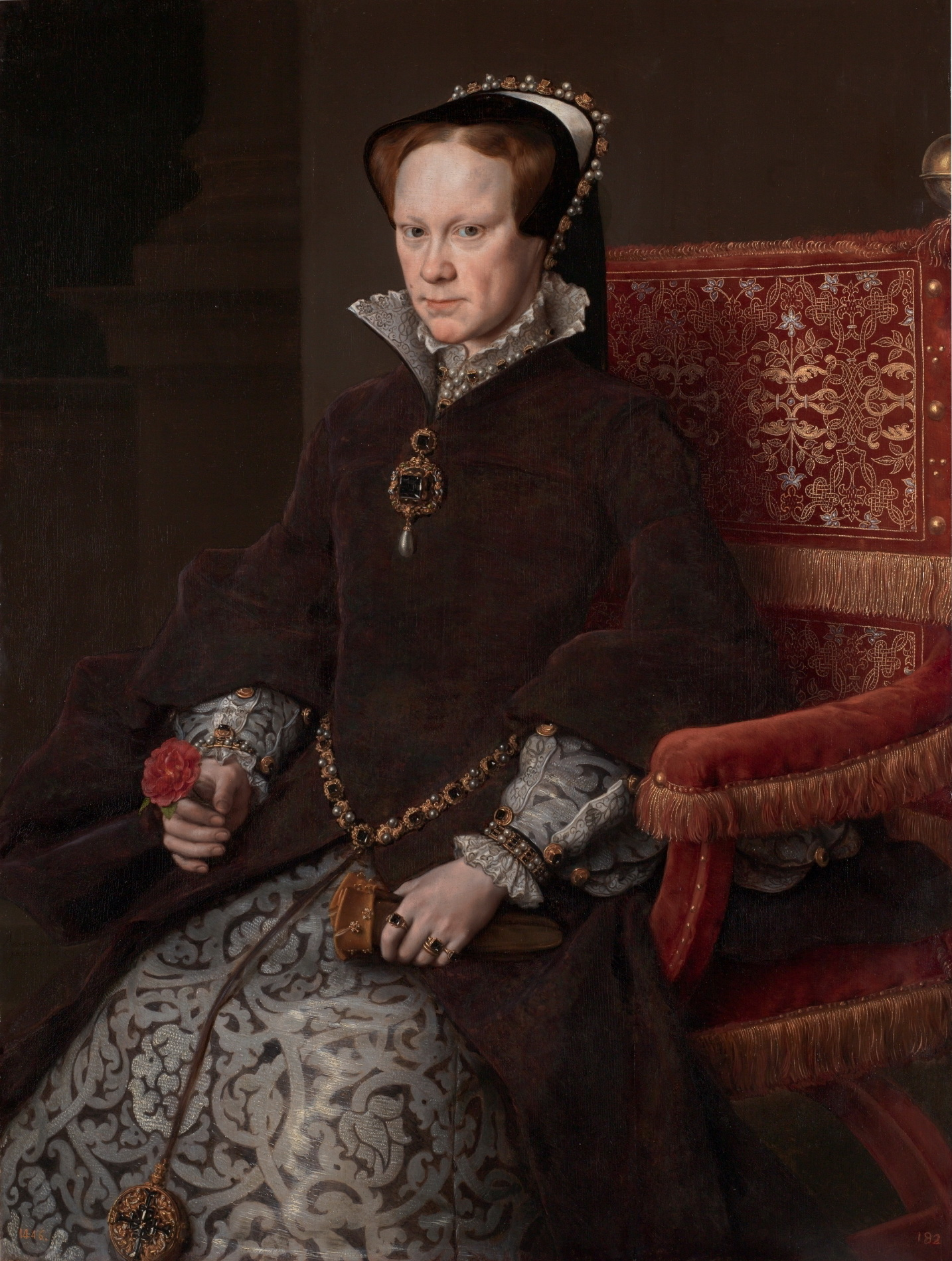 Retrato de la reina María I de Inglaterra (1516-1558), más conocida como María Tudor, que fue hija del rey Enrique VIII de Inglaterra y de la reina Catalina de Aragón y reina consorte de España por su matrimonio con Felipe II, hijo del emperador Carlos I de España.